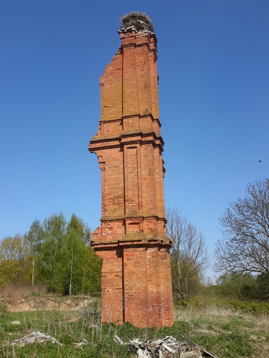 Іванск. Рэшткі сядзібнага дома